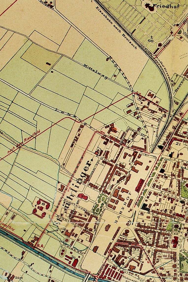 Stühlinger - quarter of Freiburg im Breisgau 1898.